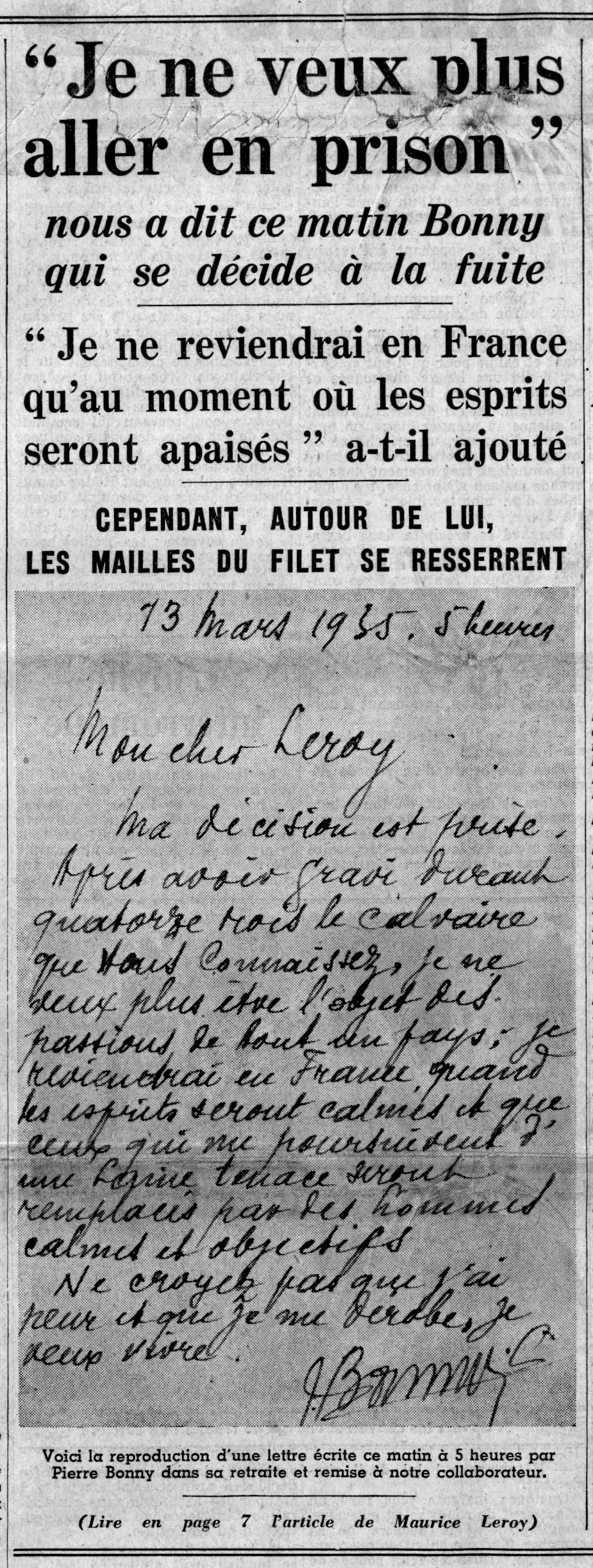 Paris-Soir publie à la une, le 14 mars 1935, une lettre où Pierre Bonny annonce son intention de prendre la fuite : "Ma décision est prise. Après avoir gravi durant quatorze mois le calvaire que vous connaissez, je ne veux plus être l'objet des passions de tout un pays ; je reviendrai en France quand les esprits seront calmés et que ceux qui me poursuivent d'une haine tenace seront remplacés par des hommes calmes et objectifs. Ne croyez pas que j'ai peur et que je me dérobe. Je veux vivre."